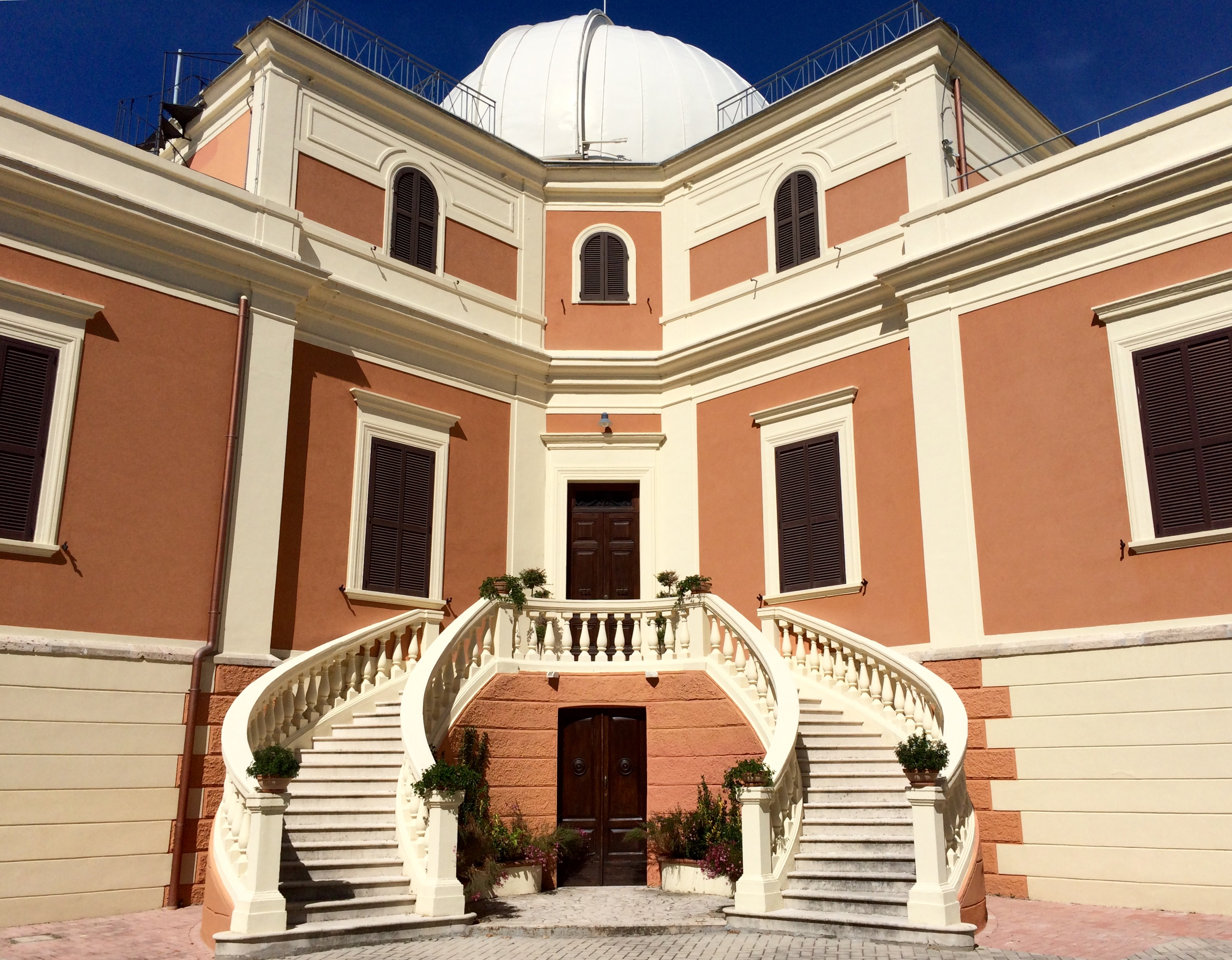 Il padiglione principale Licensing